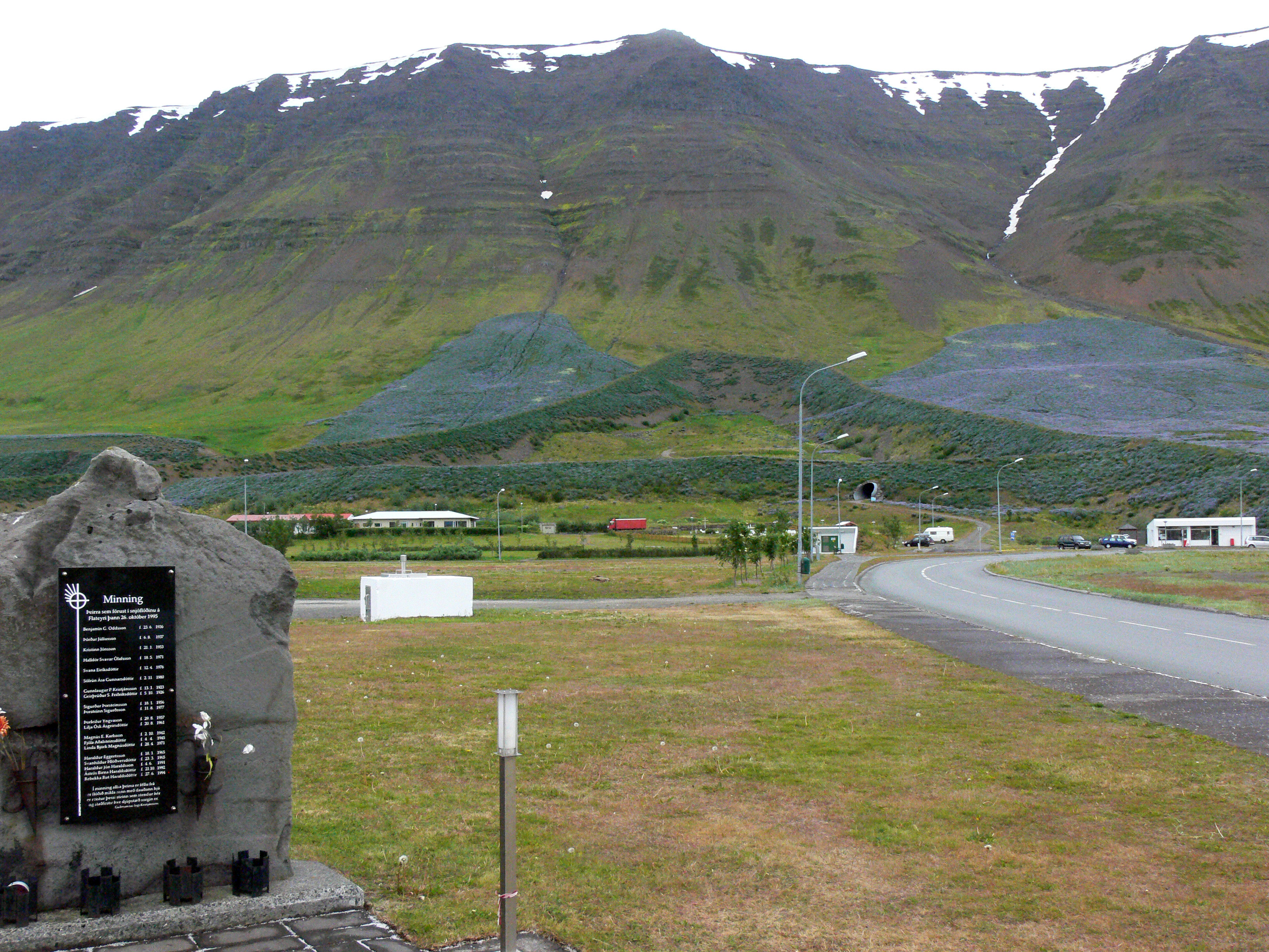 Flateyri. Links das Denkmal für die im Lawinenunglück vom 26. Oktober 1995 Umgekommenen. Im Hintergrund die neuen Lawinendämme, mir Lupinen bewachsen.